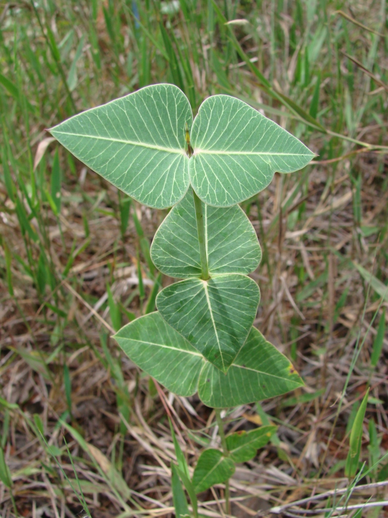 Barjonia cymosa - APOCYNACEAE Jardim Botânico de Brasília - Distrito Federal - Brasil.